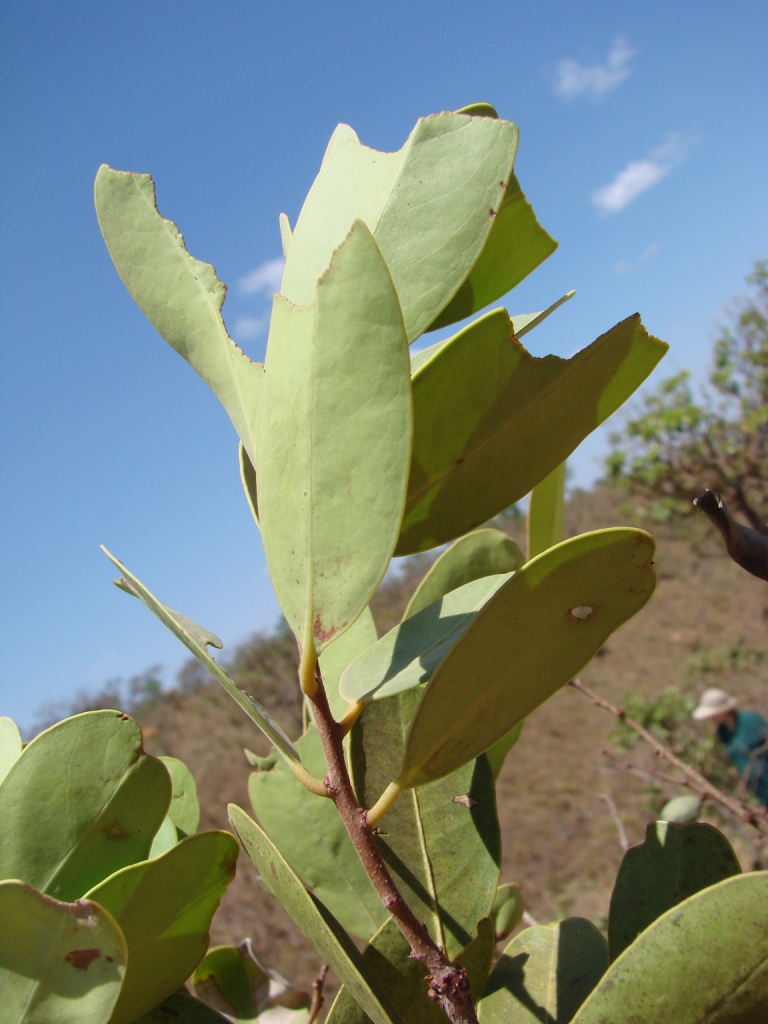 Peritassa campestris (Cambess.)A.C.Sm. - Sin. Salacia campestris - CELASTRACEAE - APA da Bacia do Rio São Bartolomeu - Brasília - Distrito Federal - Brasil.